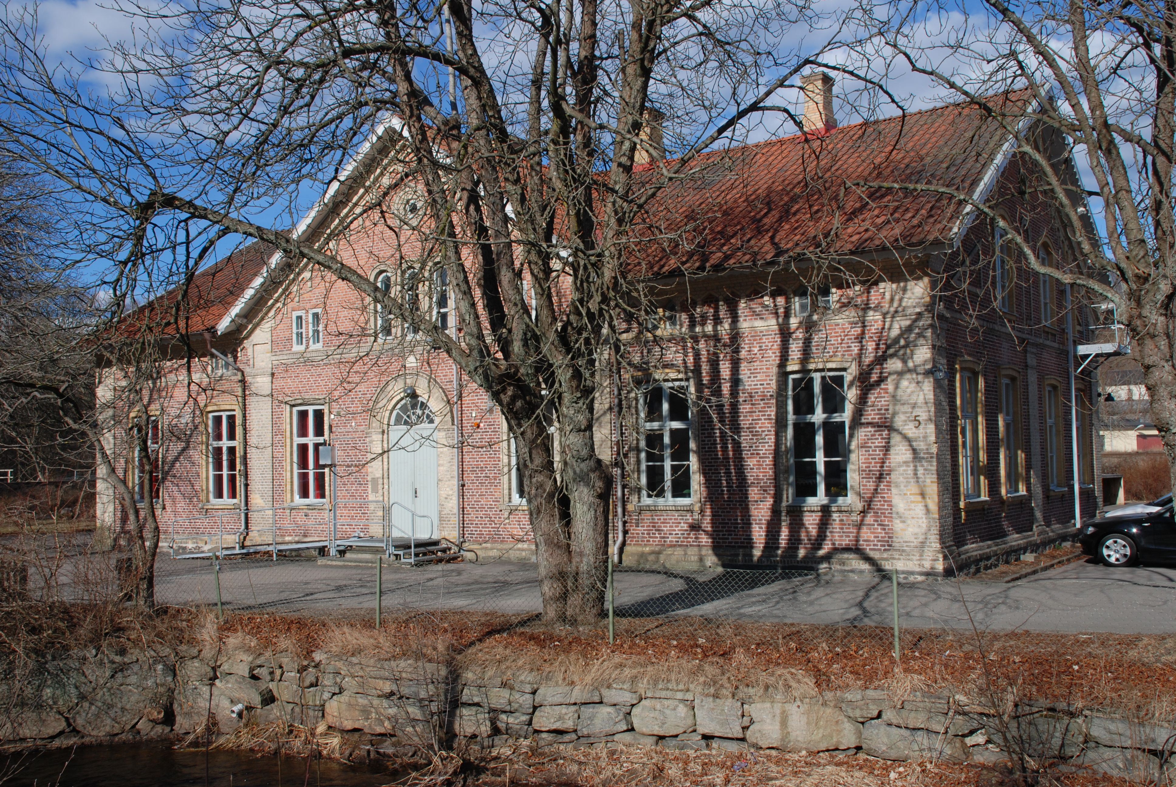 Grevedämmets skola vid Kvarnbygatan intill Mölndals Kvarnby.